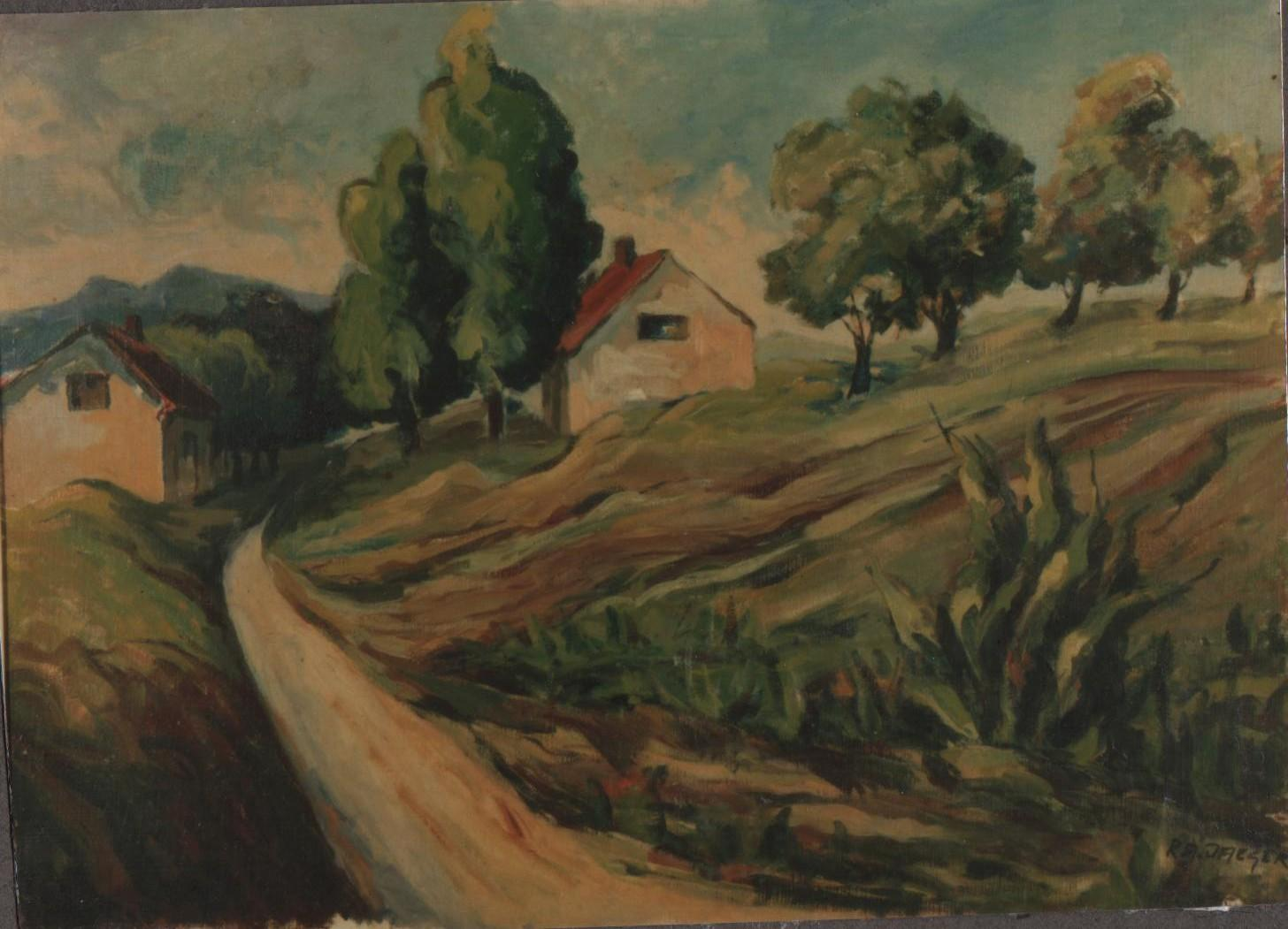 Paysage des Cevennes